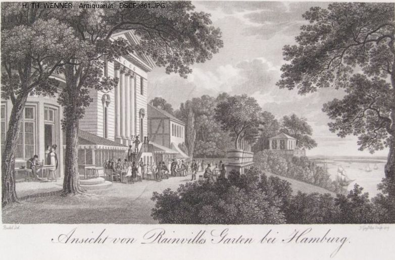 "Ansicht von Rainvilles Garten bei Hamburg". Kupferstich1828 von Christian Gottfried Heinrich Geißler (1770-1844) nach Anton Radl (1774-1852)